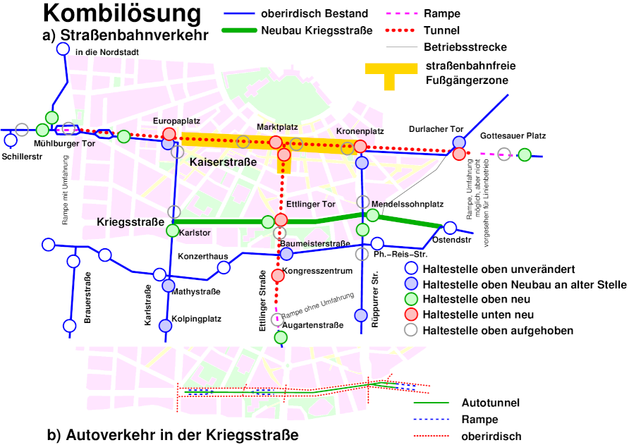 Prinzip und Bestandtteile der Kombilösung (Karlsruhe)